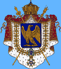 Armoiries du Second Empire (France)